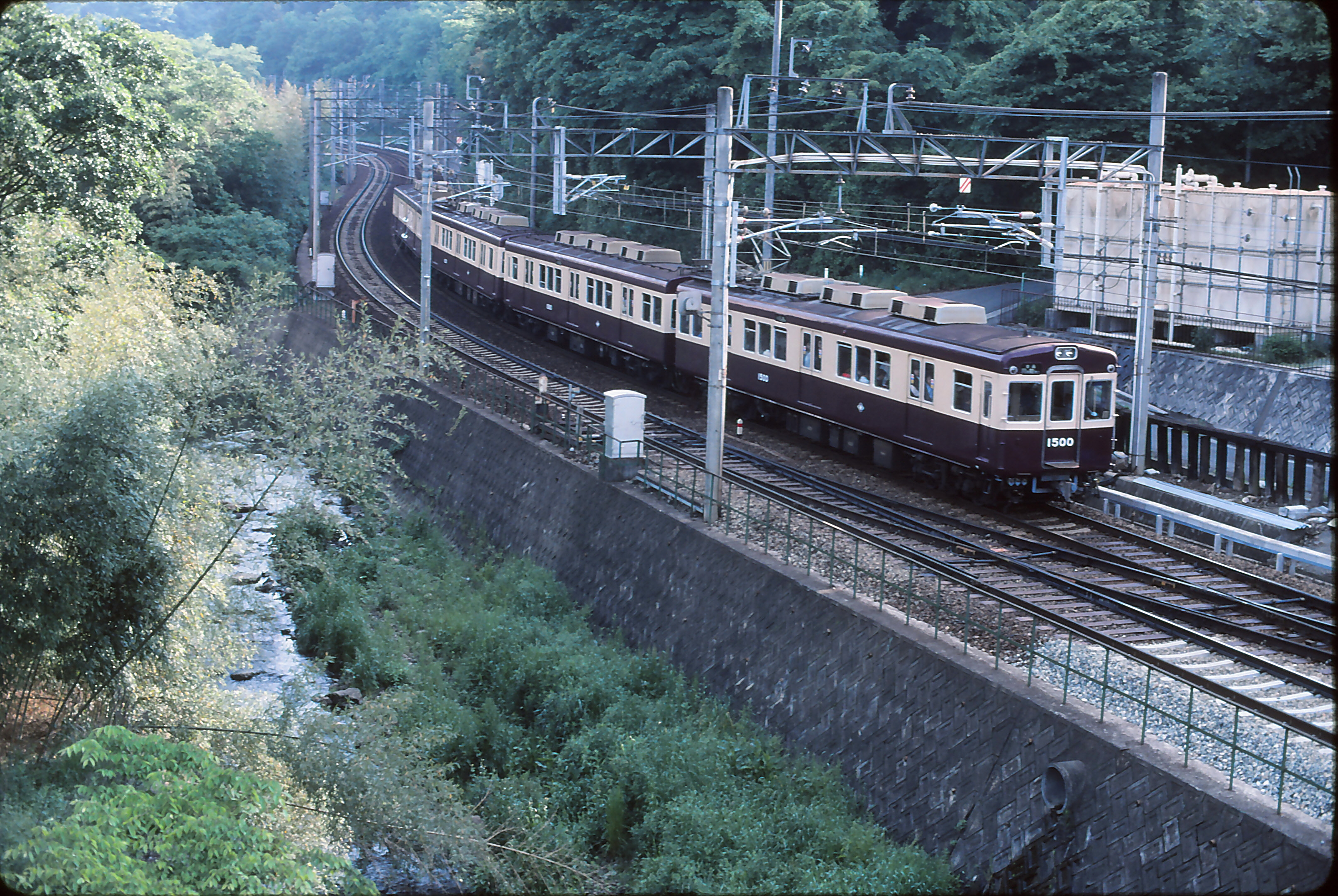 能勢電鉄妙見線 一の鳥居駅-平野駅